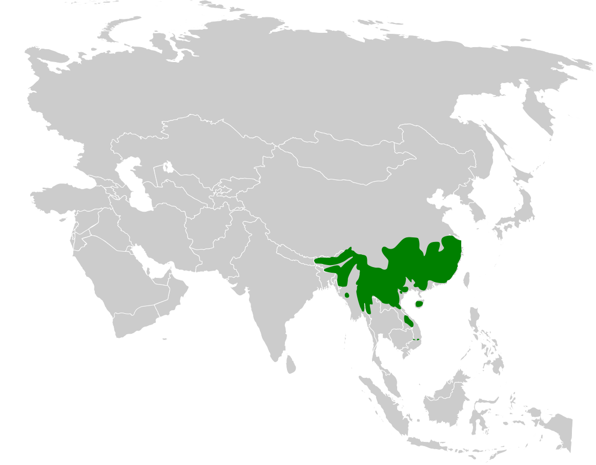 Psittiparus distribution map